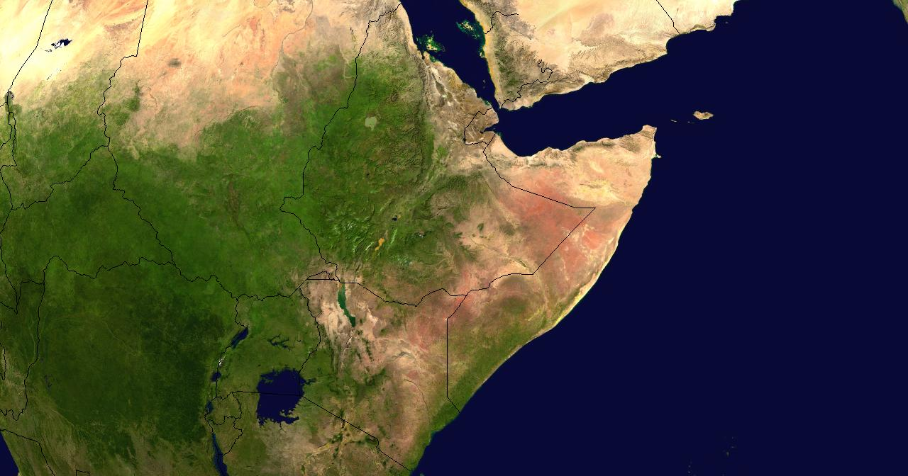 Blue-Marble-Aufnahme der NASA aus World Wind